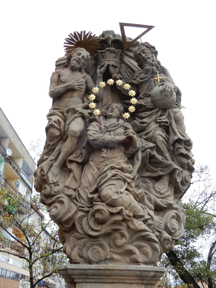 Kladsko - most sv. Jana, barokní sousoší Korunování Panny Marie